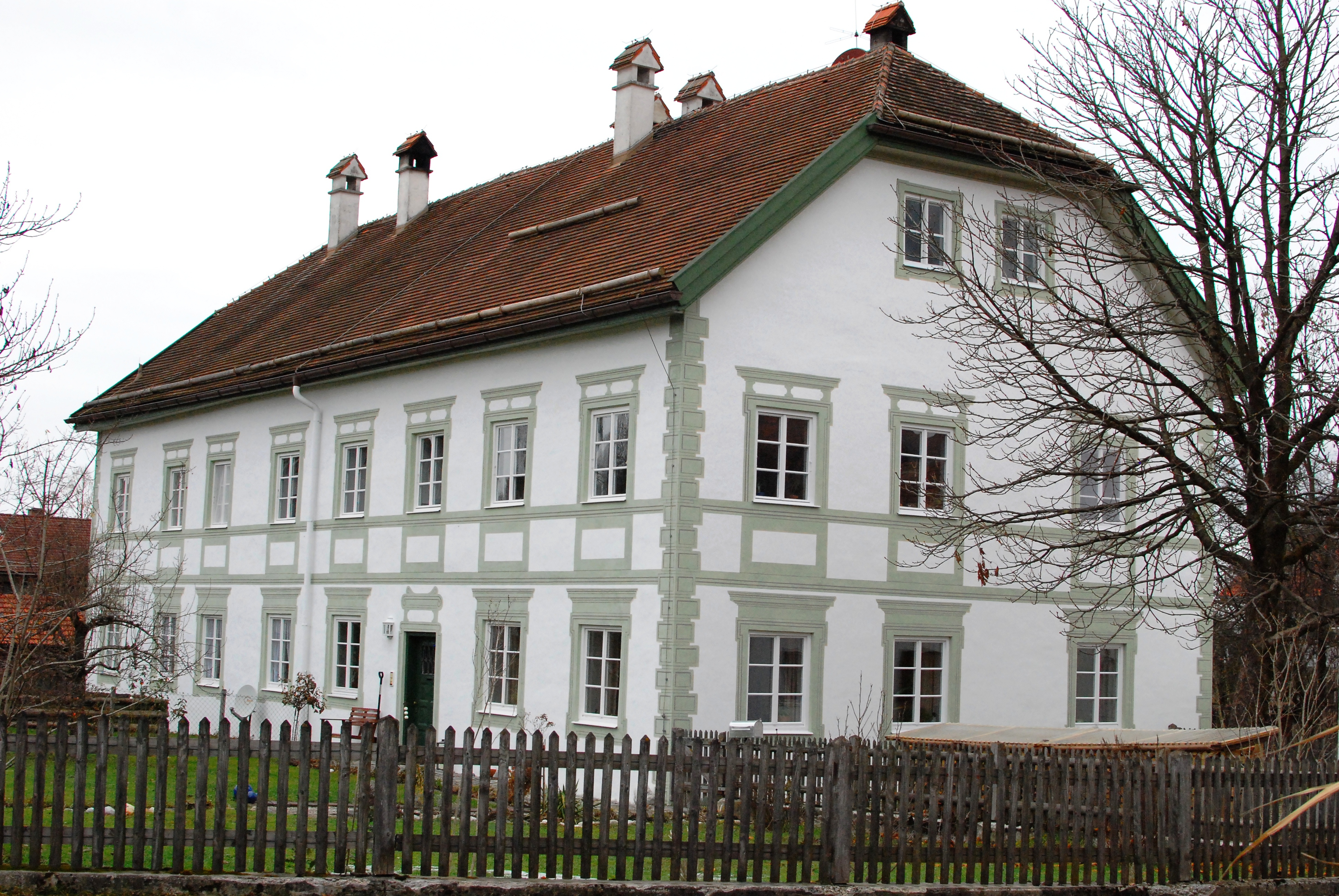 Ehemaliges Gerichtsschreiberhaus, später Forstamtsgebäude, in der Bahnhofstraße 26 in Benediktbeuern, Landkreis Bad Tölz-Wolfratshausen, Regierungsbezirk Oberbayern, Bayern. Als Baudenkmal unter Aktennummer D-1-73-113-6 in der Bayerischen Denkmalliste aufgeführt.